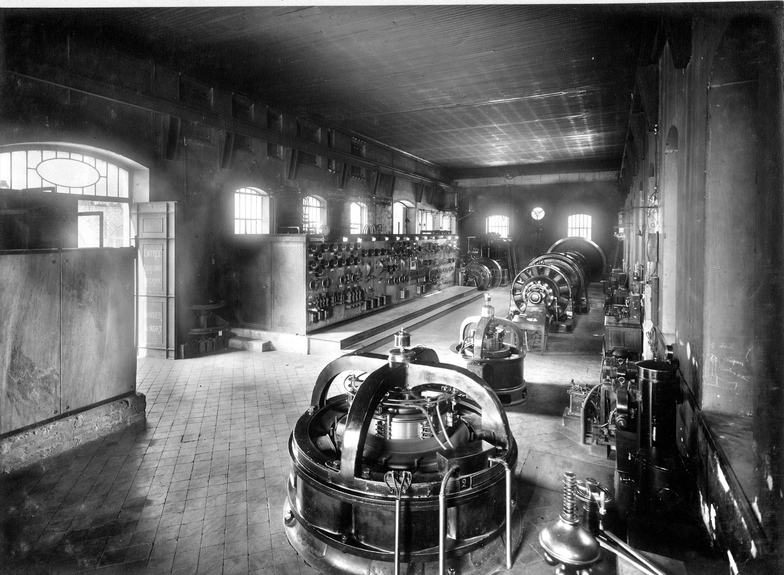 Centrale N°1